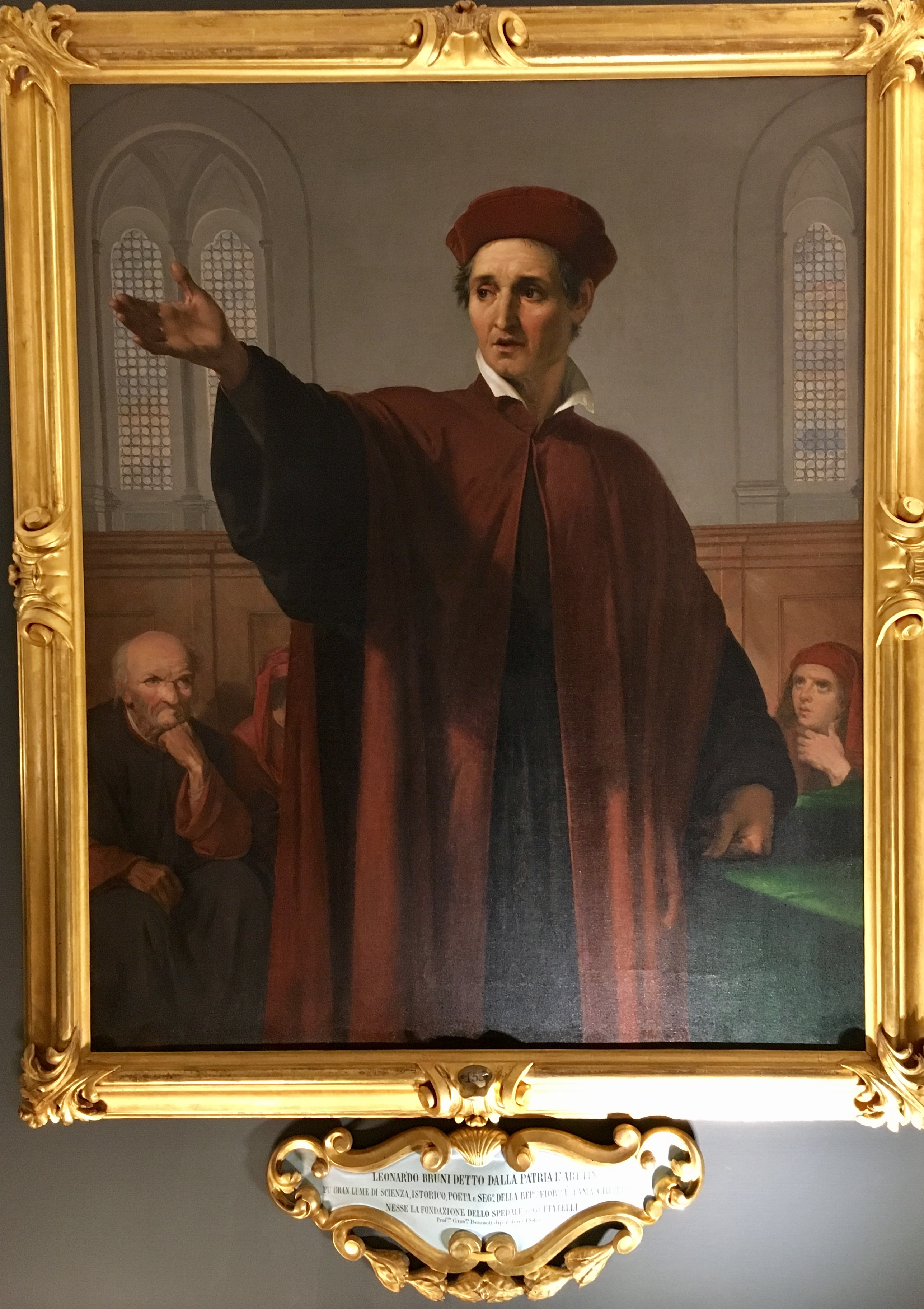 Leonardo Bruni promuove la fondazione dell'Ospedale degli Innocenti di Giuseppe Bezzuoli, 1845-1846